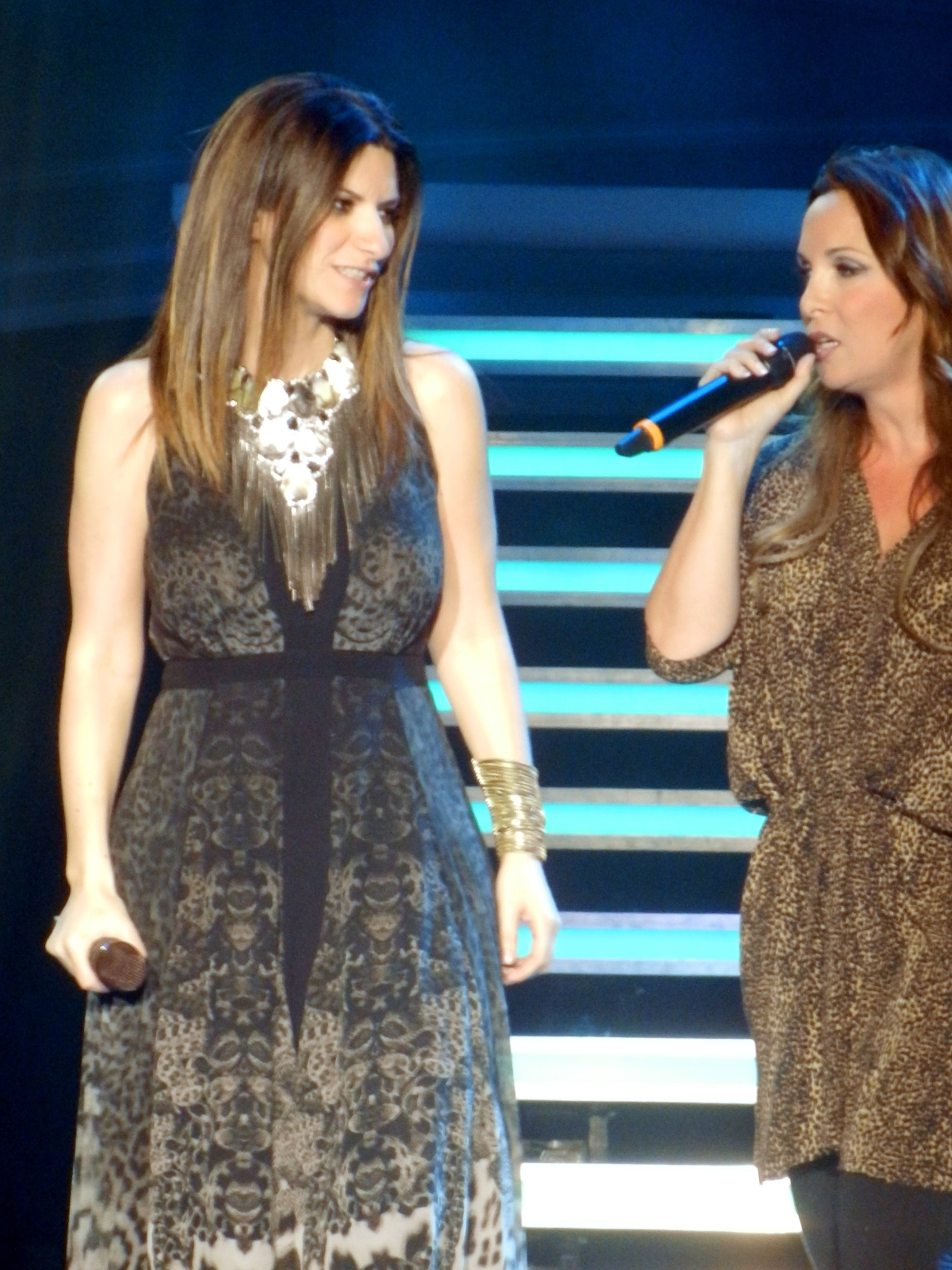 Laura Pausini 12 - Bercy - Avril 2012